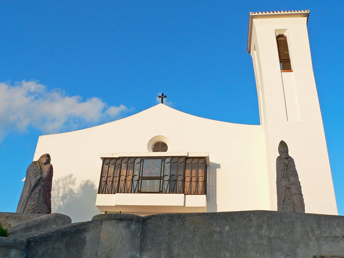 Giba-Villarios. La parrocchiale di San Giuseppe nel paese nuovo